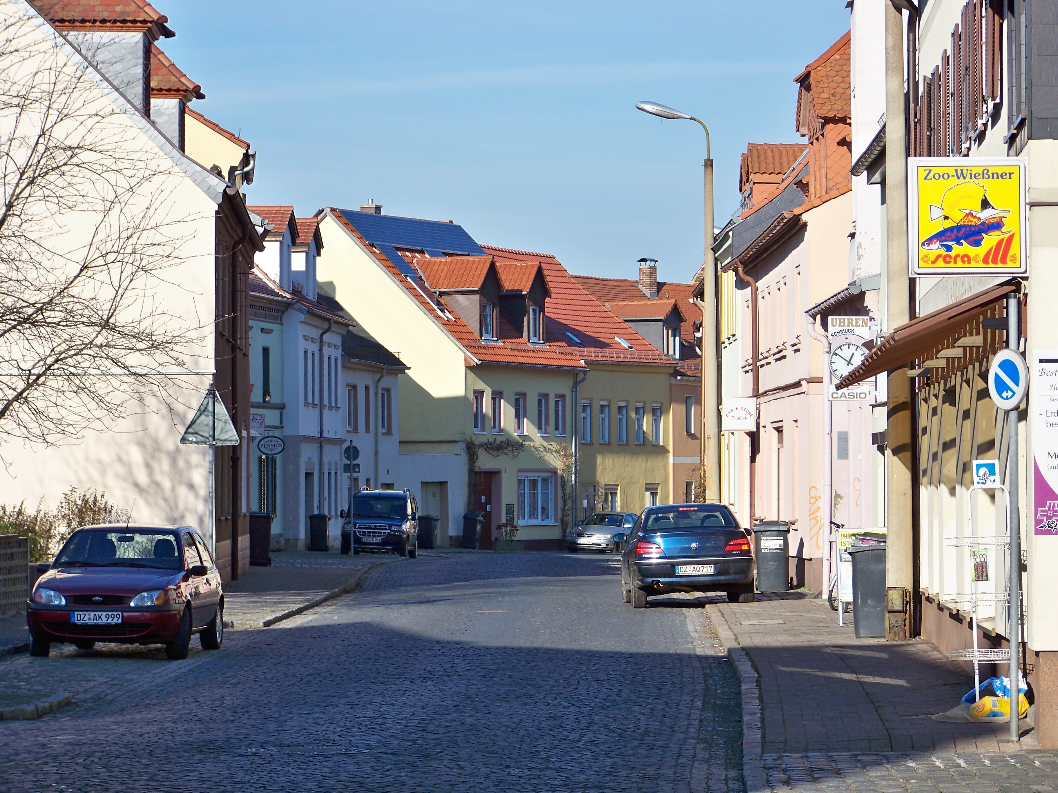 Eilenburger Straße stadtauswärts in Taucha (bei Leipzig)